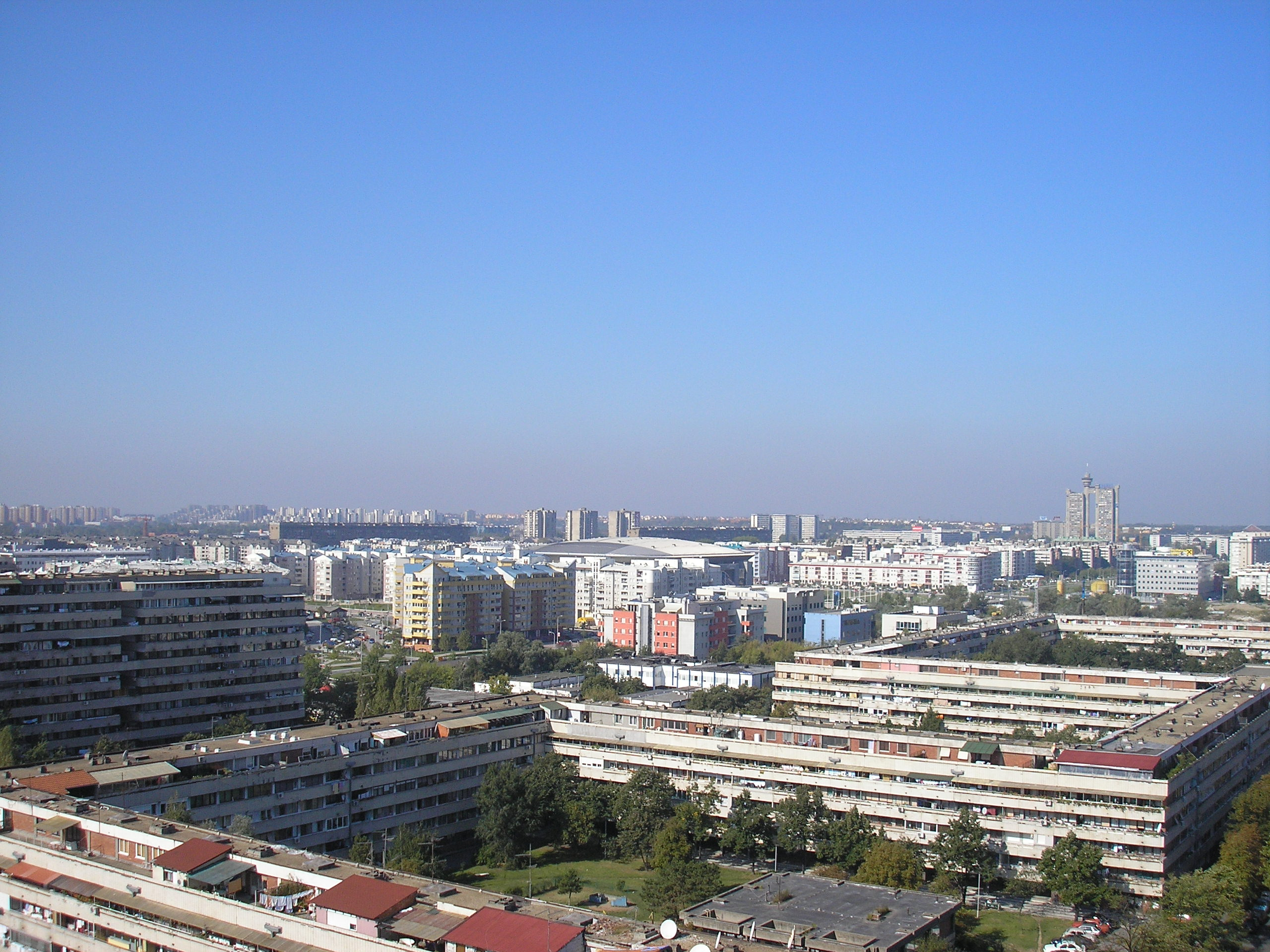 Аутор: User:Михајло Анђелковић